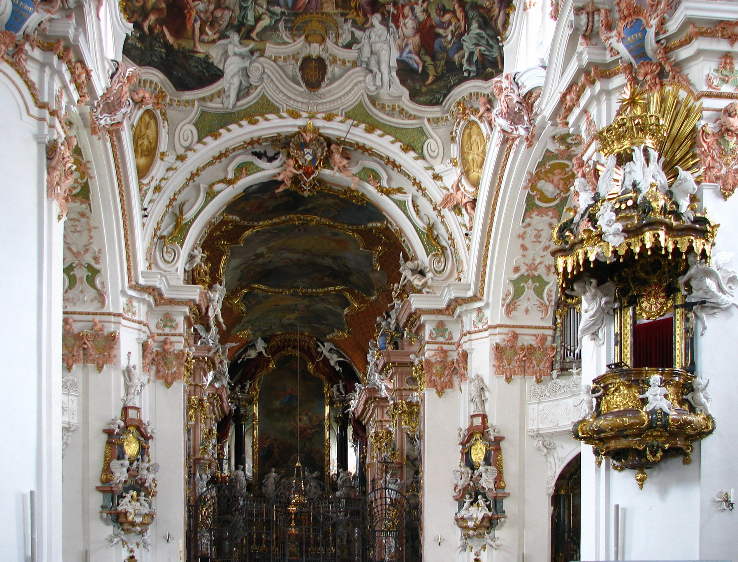 Abbey church in Einsiedeln (SZ) in Switzerland